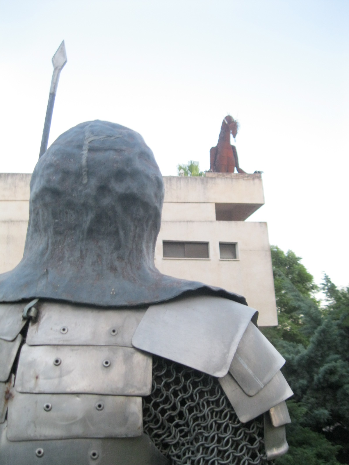 פסל האביר והדרקון מכפר הנשיא